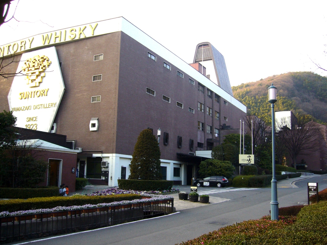 大阪府三島郡島本町山崎にあるサントリー山崎蒸溜所。日本初の本格的ウイスキー蒸溜所。鳥井信治郎や初代工場長の竹鶴政孝の努力の中から生まれた記念すべき工場。2007年2月12日に投稿者が撮影。€€